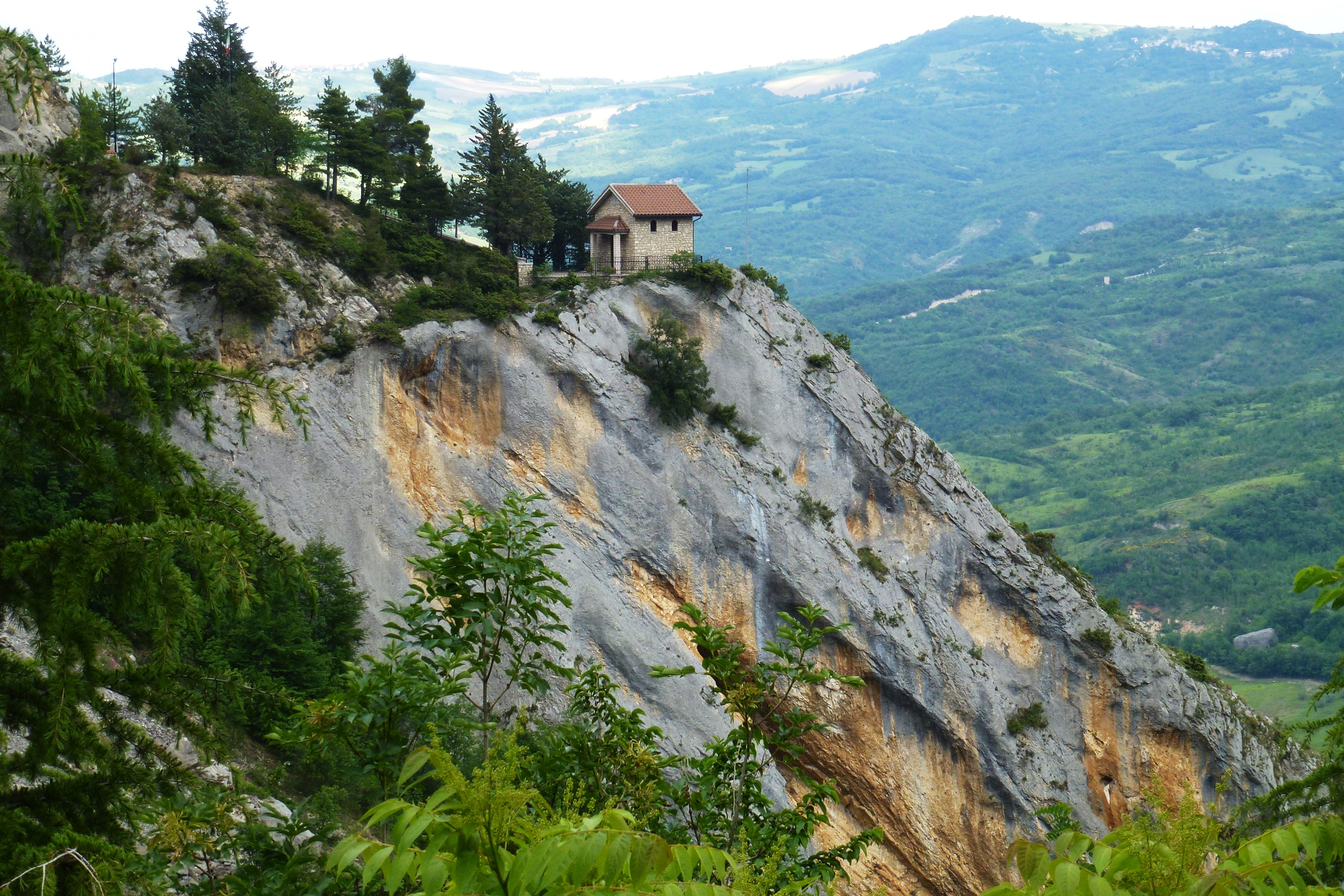 Chiesetta sulla roccia